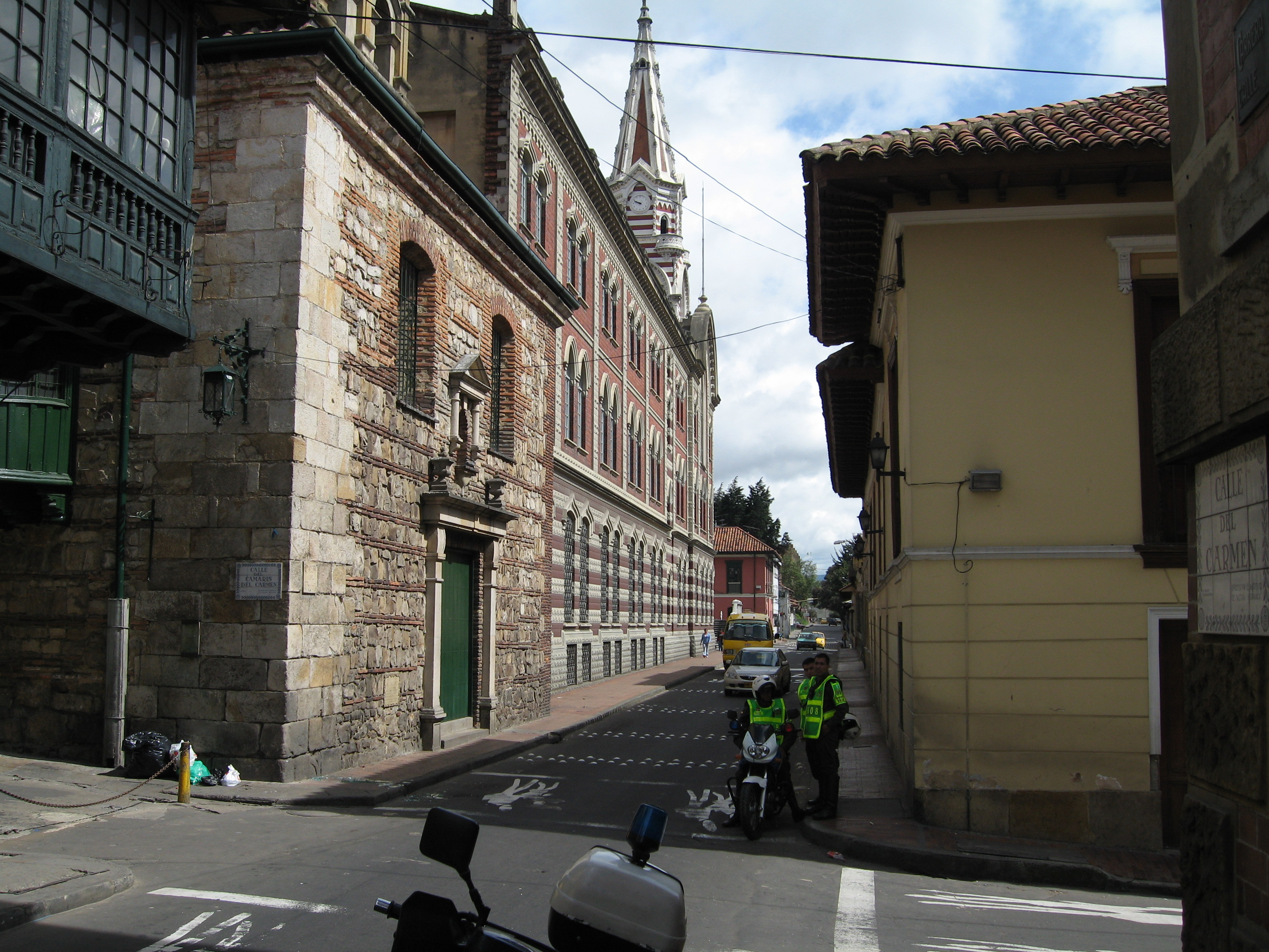 Camarin del Carmen